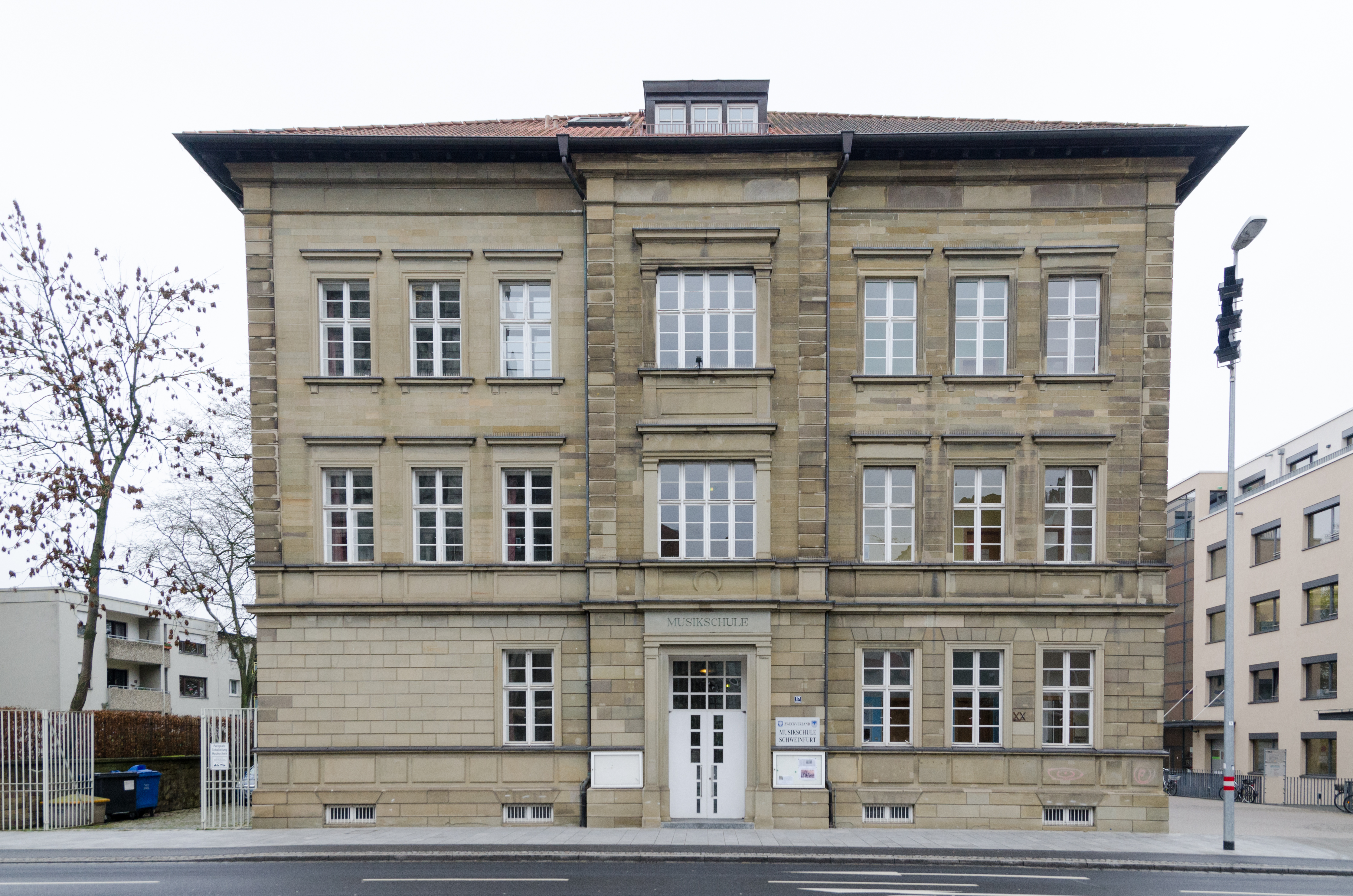 Schweinfurt, Schultestraße 17